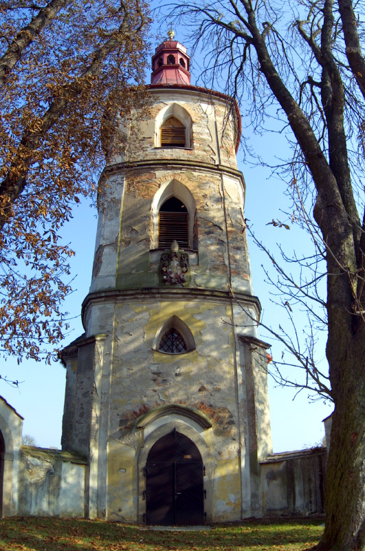 Věž kostela sv. Prokopa ve Všehrdech.